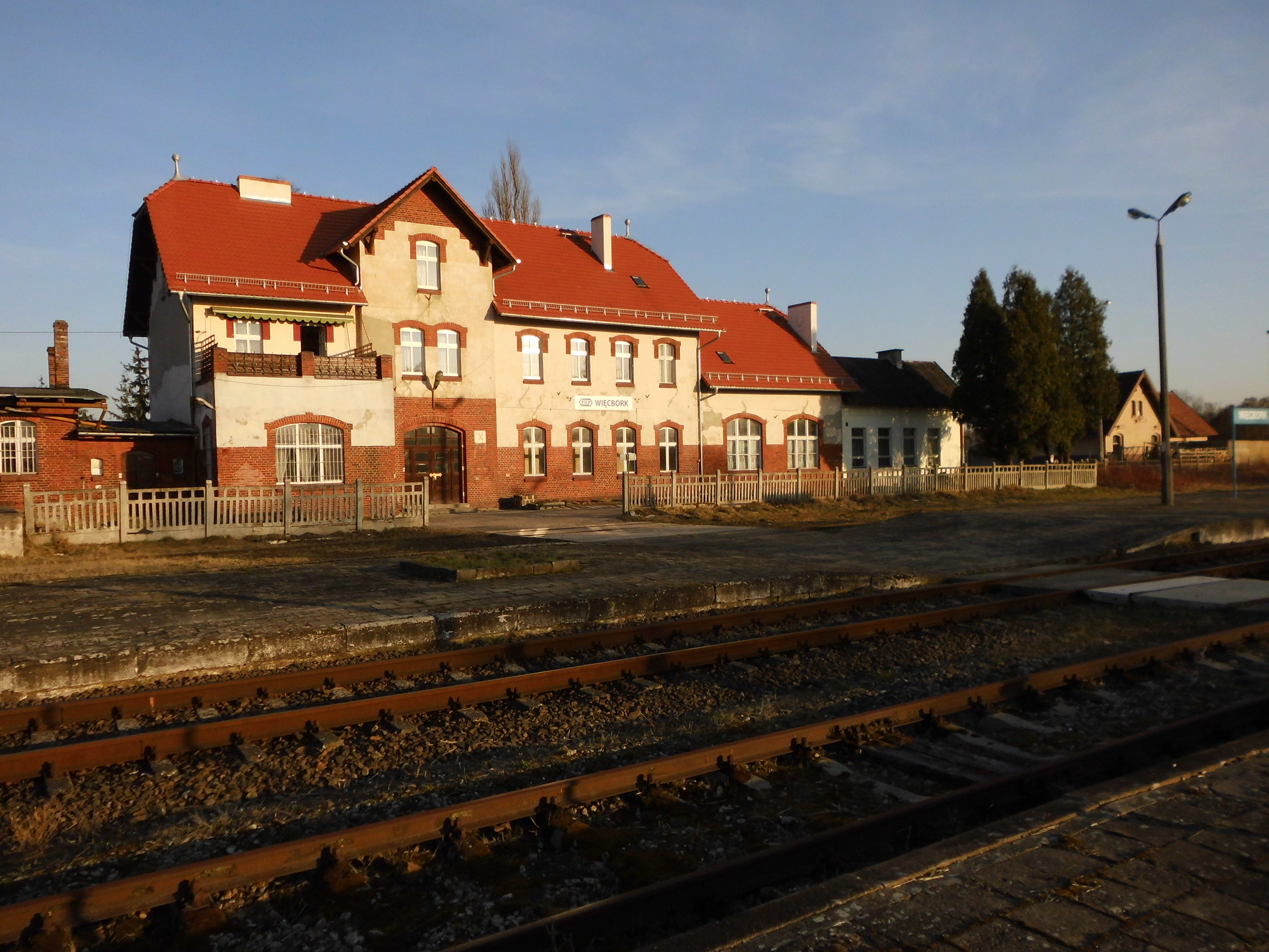 Stacja PKP Więcbork LK 281 - 2018 r.